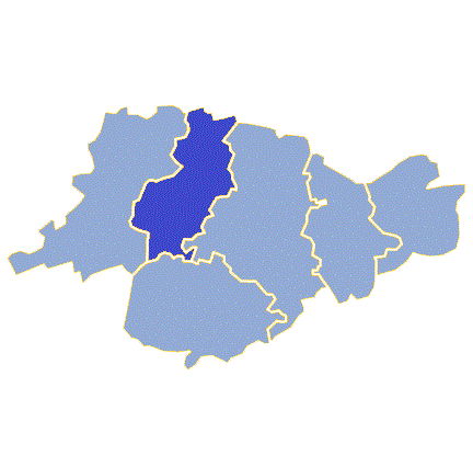 Powiat świebodziński - Gmina Lubrza